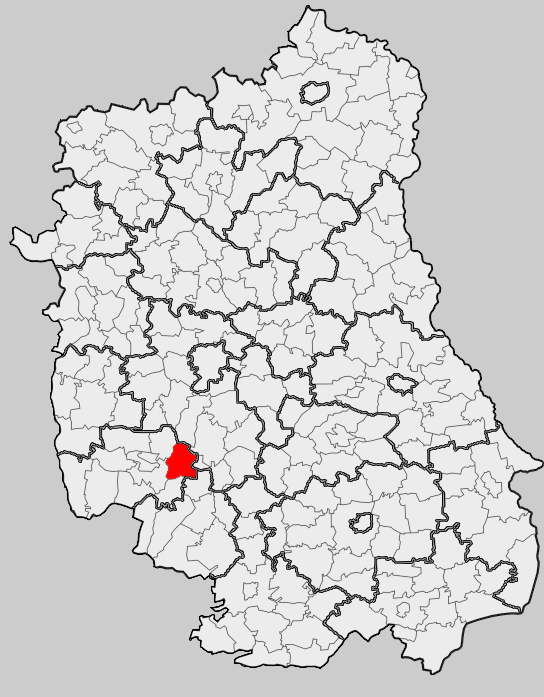 Map of gmina Zakrzówek, Kraśnik county, Lublin voivodship Mapa gminy Zakrzówek, powiat kraśnicki, województwo lubelskie